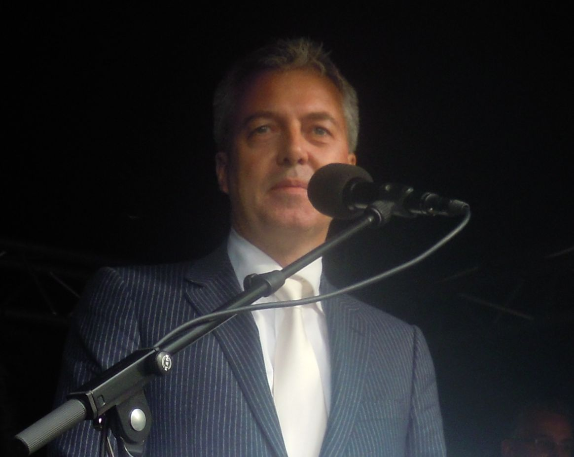 Marco Pastors bij de herdenking van de moord op Pim Fortuyn in Rotterdam (uitsnede)